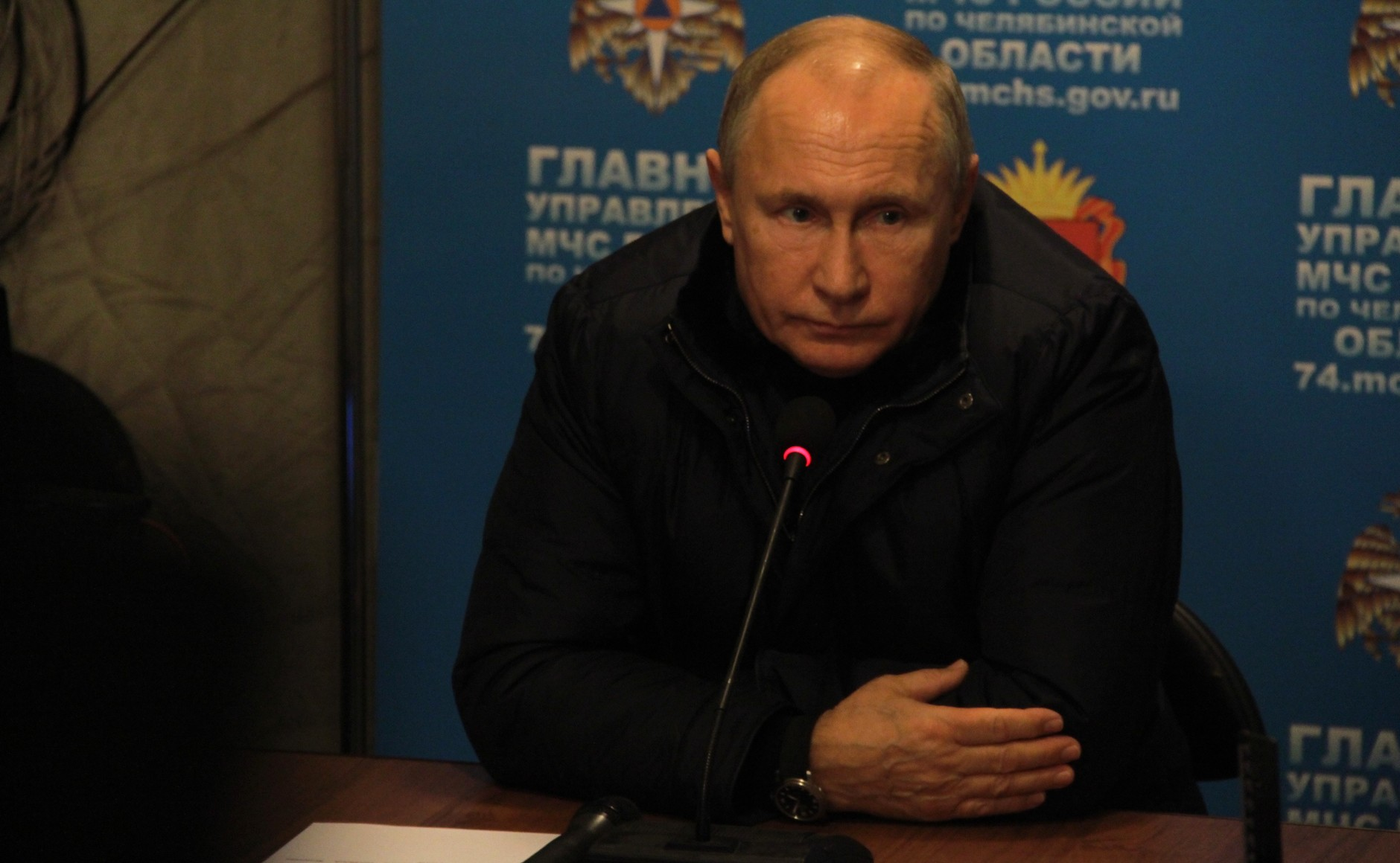 Президент провёл оперативное совещание в штабе МЧС в Магнитогорске